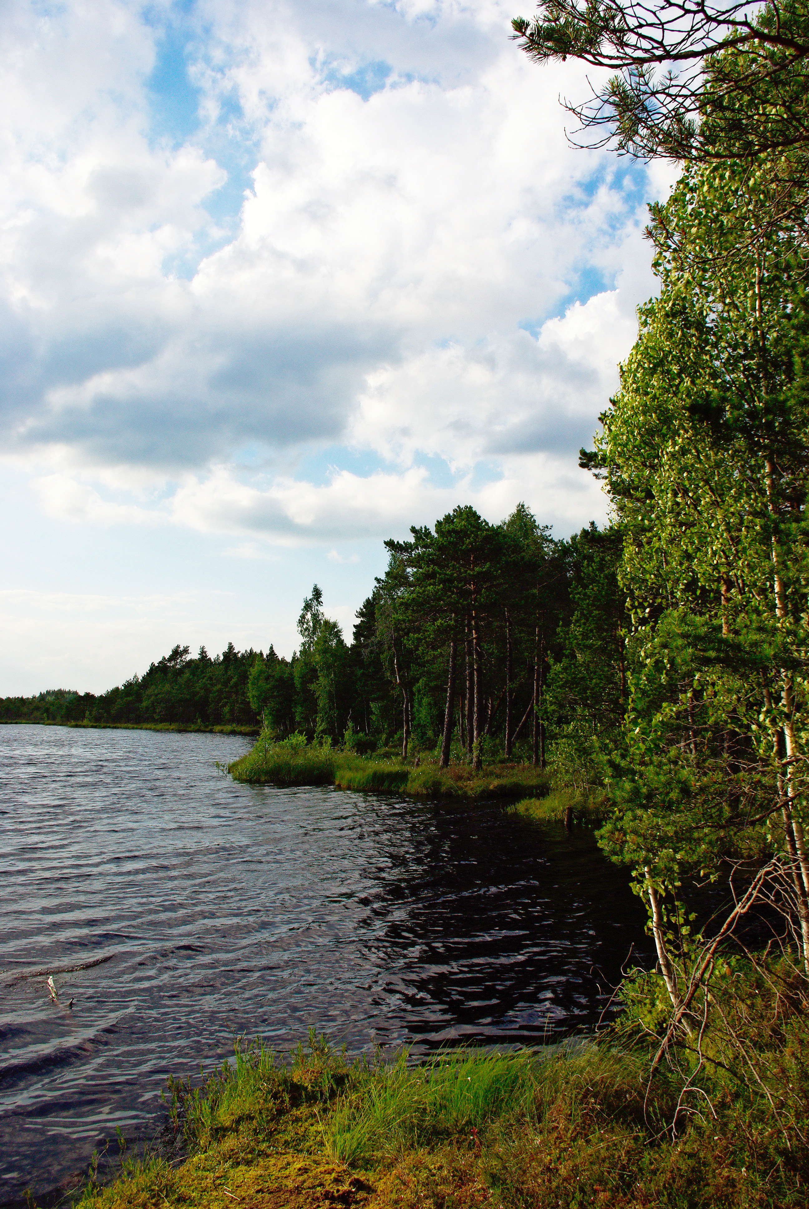 Uljaste Mädajärv ka: Väike Uljaste järv, Uljaste Soojärv